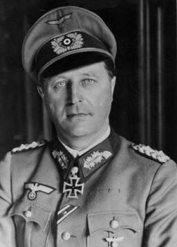 Factual corrections and alternative descriptions are encouraged separately from the original description. Additionally errors can be reported at this page to inform the Bundesarchiv. Original historic description: Hohe Auszeichnungen, Breith, Bäke, Karl Hohe Auszeichnungen Der Führer verlieh das Eichenlaub mit Schwertern zum Ritterkreuz des Eisernen Kreuzes an General der Panzertruppen Hermann Breith (links), Kommandierender General eines Panzerkorps, als 48. und Oberstleutnant d.R. Franz Bäke (Mitte), Kommandeur eines Panzerregiments, als 49. Soldaten der deutschen Wehrmacht.- Mit dem Eichenlaub zum Ritterkreuz des Eisernen Kreuzes wurde Unteroffizier Josef [ auch: Joseph] Karl (rechts), Geschützführer in einer Panzerjäger-Abteilung, als 597. Soldat der deutschen Wehrmacht ausgezeichnet. Scherl Bilderdienst (OKW) 24.2.44 Abgebildete Personen: * Breith, Hermann: General der Panzertruppe, Ritterkreuz (RK), Heer, Deutschland